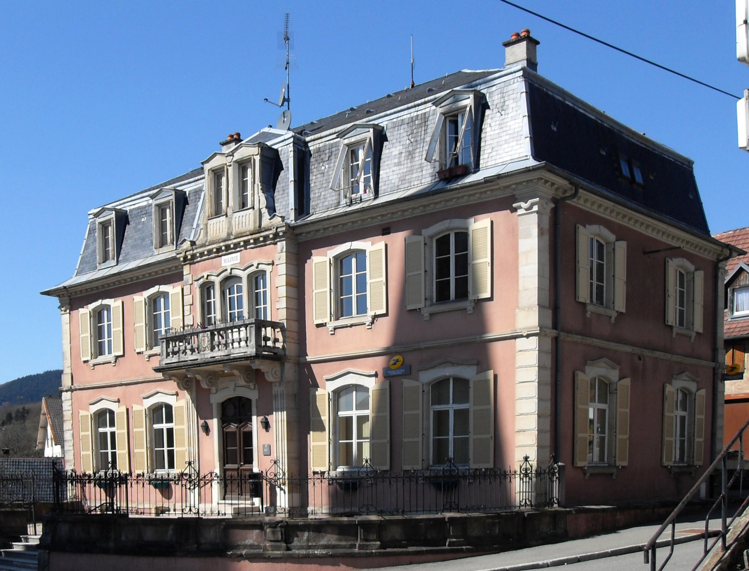 La mairie de Rougemont-le-Château